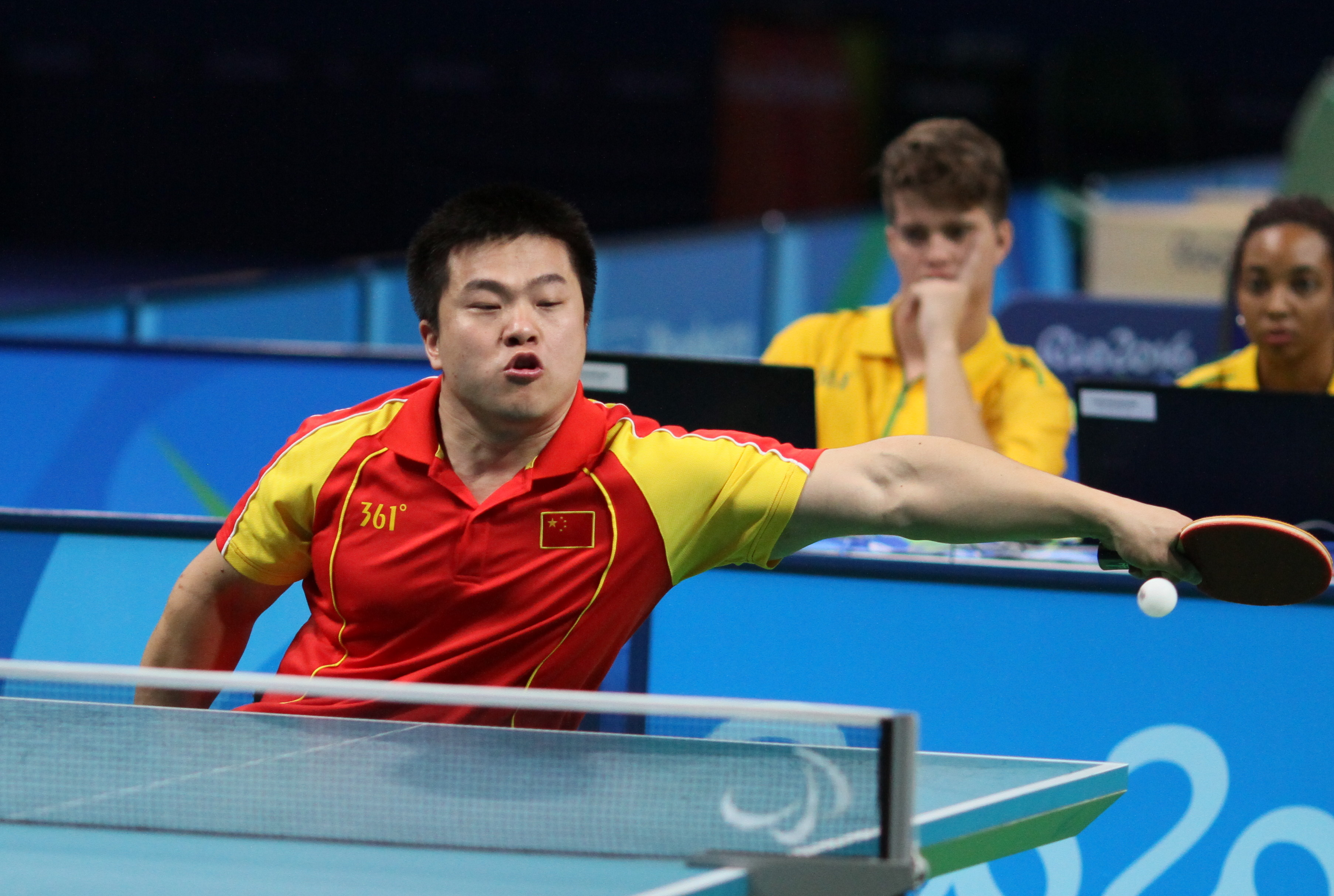 GUO Xingyuan (CHN,M4) IMG_5950